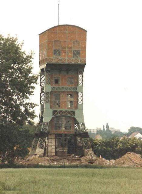 Abbruch des Förderturms Kaliwerk Glückauf-Sarstedt